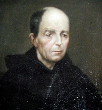 Неизвестный автор XIX века. Портрет Алонсо де Ороско.